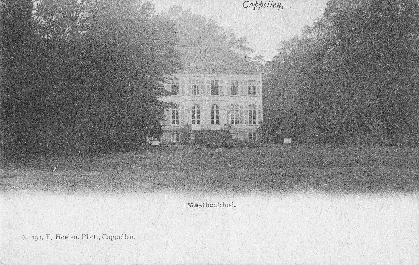 Mastbeekhof - Kapellen (Kasteel Beukenhof, heden gemeentehuis kapellen)